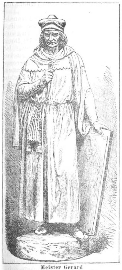 Franz Theodor Helmken: Der Dom zu Coeln, seine Geschichte und Bauweise, Bildwerke und Kunstschätze. Köln: Theod. Helmken, 1899